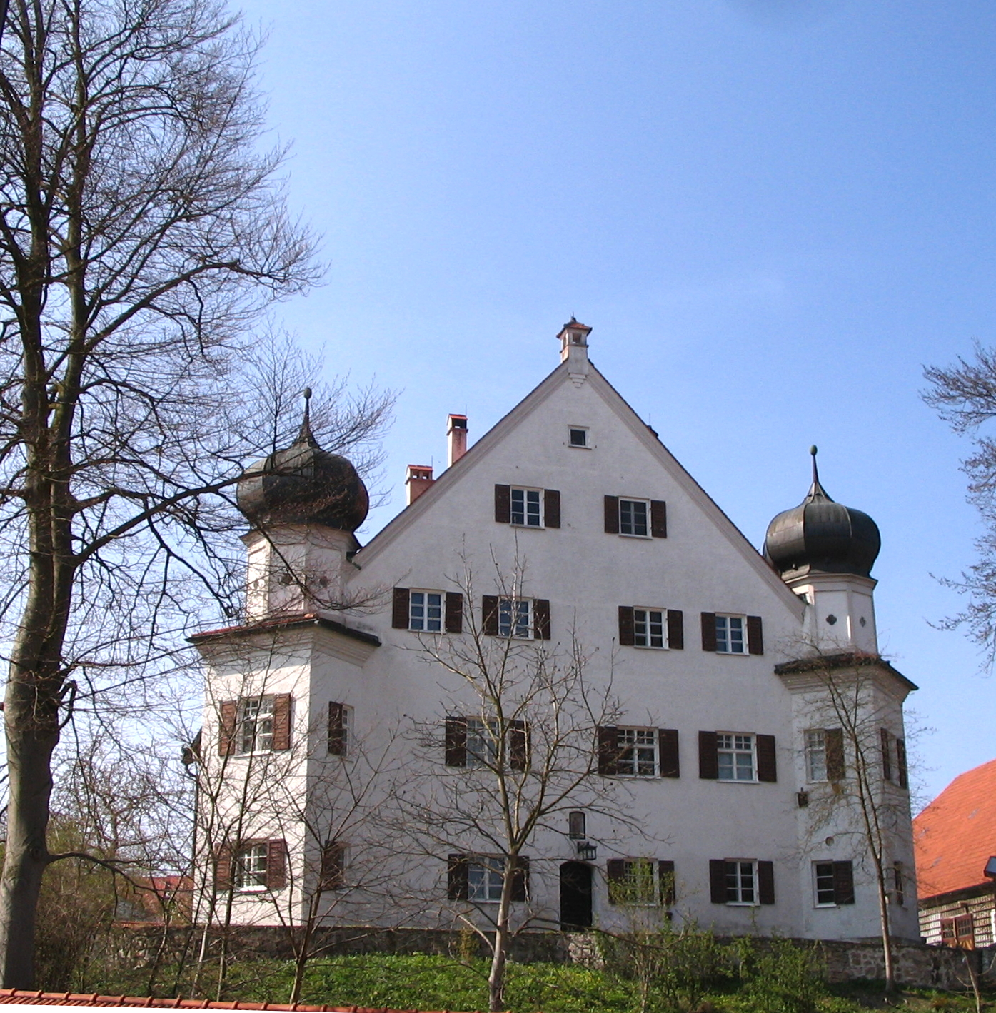 Siegenburg, Landkreis Kelheim, Niederbayern: Das von dem 1586 verstorbenen Siegenburger Ratsherrn Pilbis an Stelle der zerstörten Burg errichtete Pilbis-Schloss